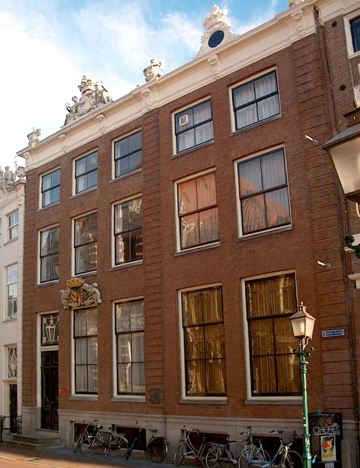 Hoorn, Grote Oost 6 (IM013767). Het Drechterlandsehuis, zetel van het Waterschap Westfriesland.